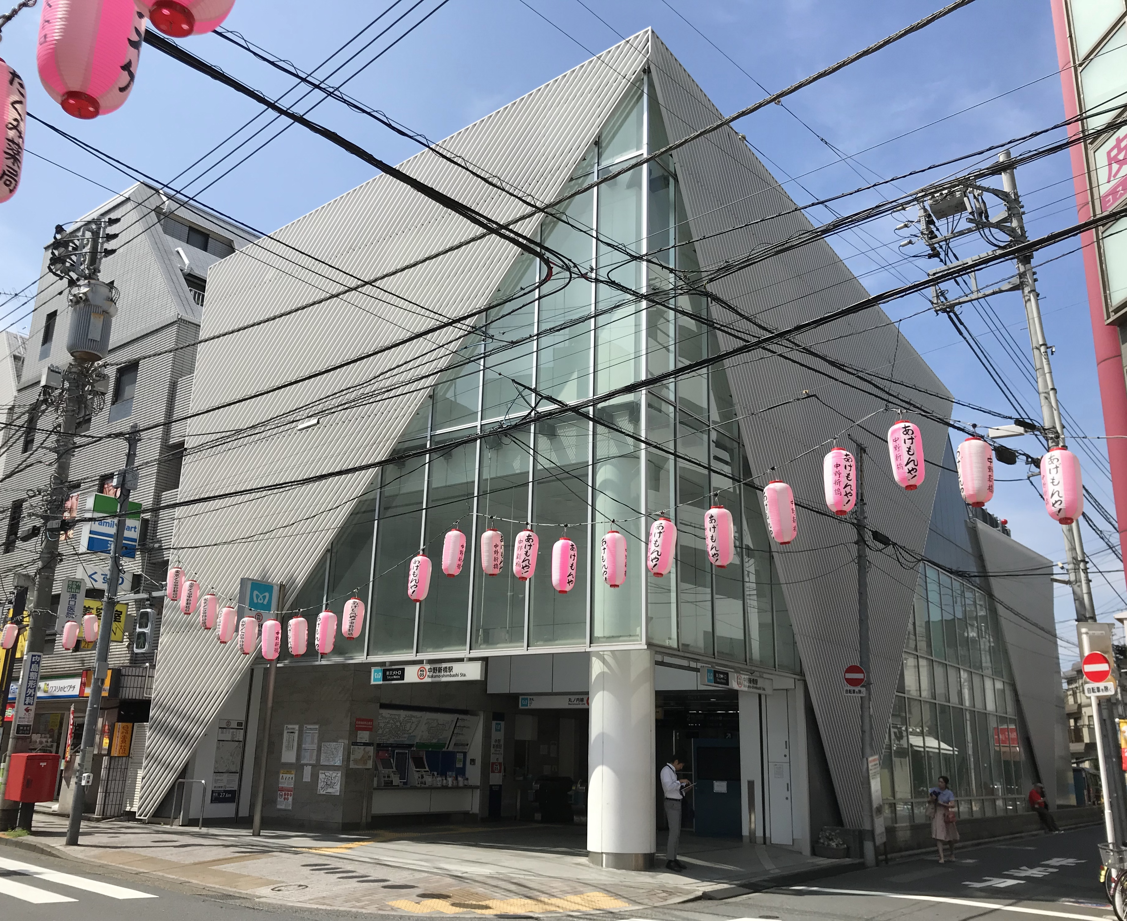 東京メトロ丸ノ内線（方南町支線）中野新橋駅舎